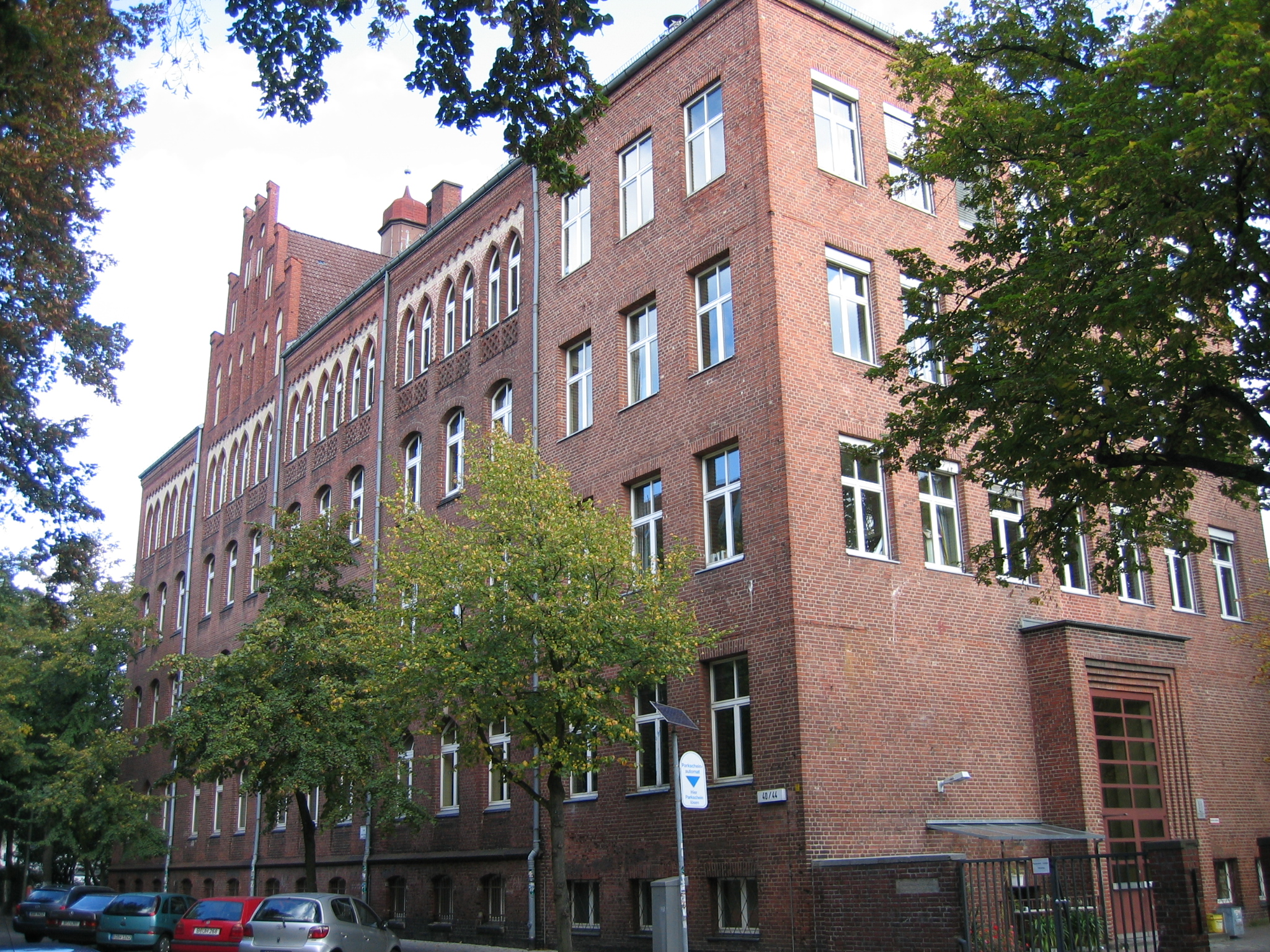 Die Freiherr-vom-Stein-Oberschule in Berlin-Spandau